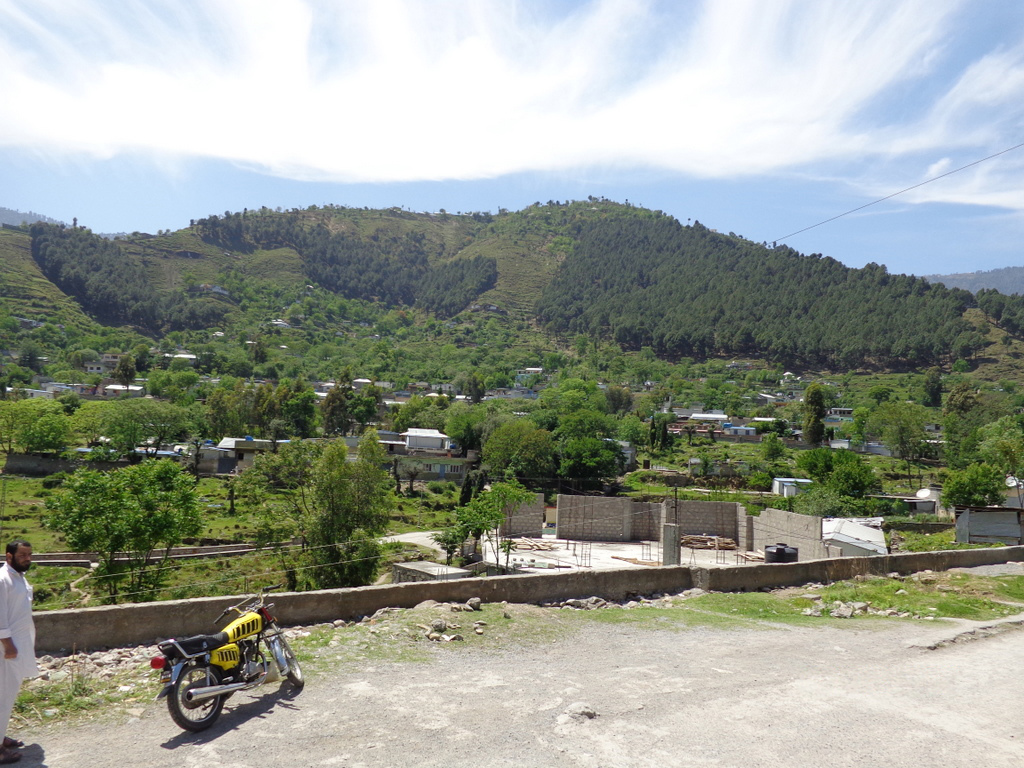 Balakot, Mansehra District, Khyber Pakhtunkhwa